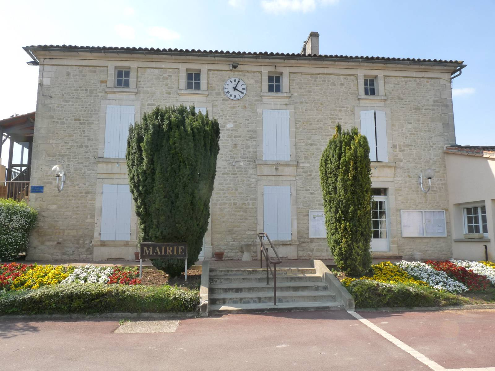 Mairie de Foussignac, Charente, France